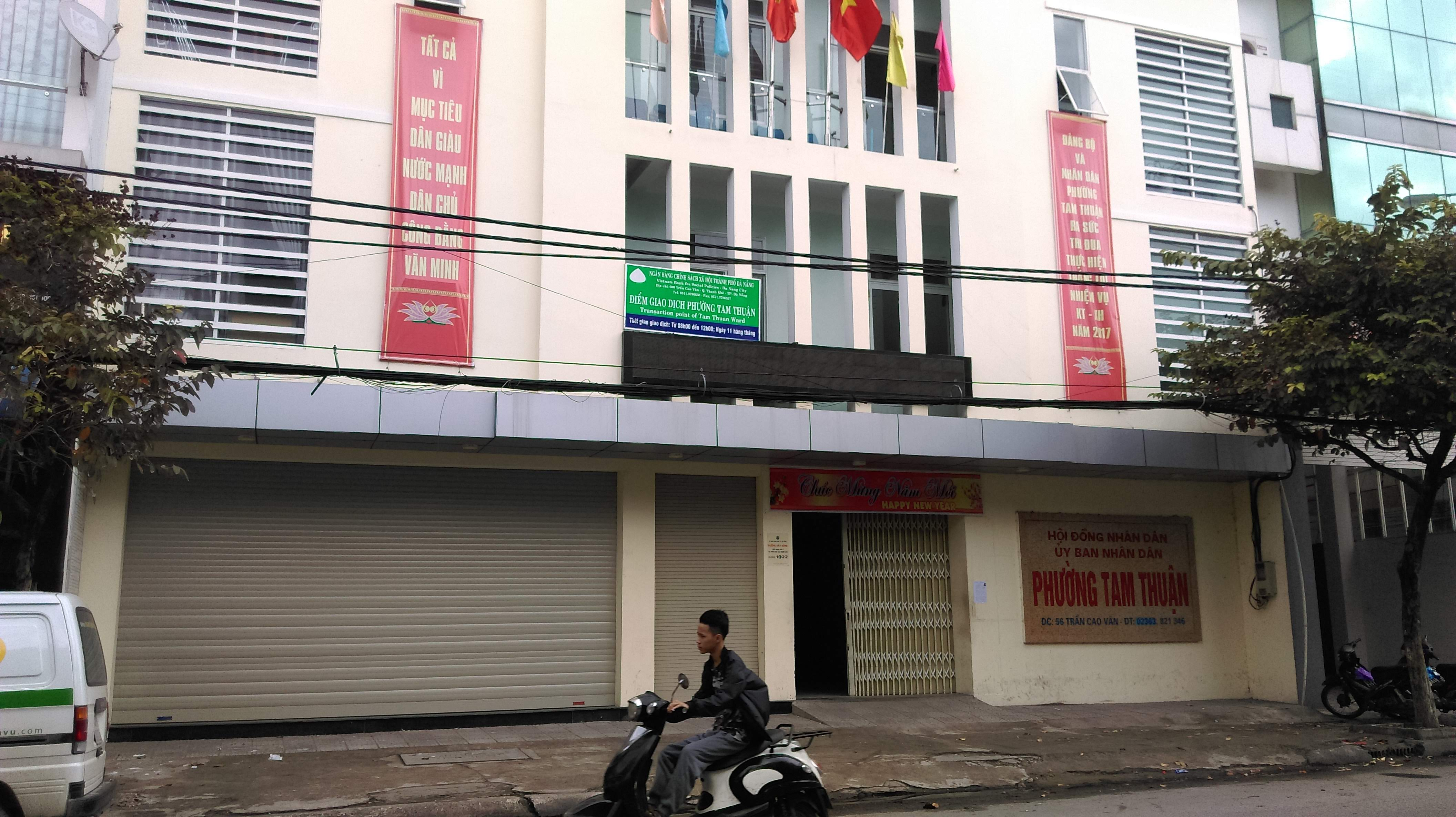 UBND phường Tam Thuận, Thanh Khê, Đà Nẵng